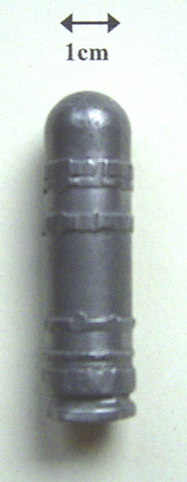 Projektil M183PD, von einer 14,5mm M31 Field Artillery Trainer, vermutlich us-amerikanisch. Gefunden um 1986. Das Geschoss ist aus Blei ohne Überzug. Im hinteren Teil ist eine ca. 1,9 cm tiefe Weißblechhülse für einen pyrotechnischen Satz eingelassen. Das Geschoss hat eine Länge von ca. 5,1 cm, Kaliber ca. 1,9 cm und wiegt etwa 54 g. Es wurde aus einer Waffe mit 8 Zügen abgefeuert.